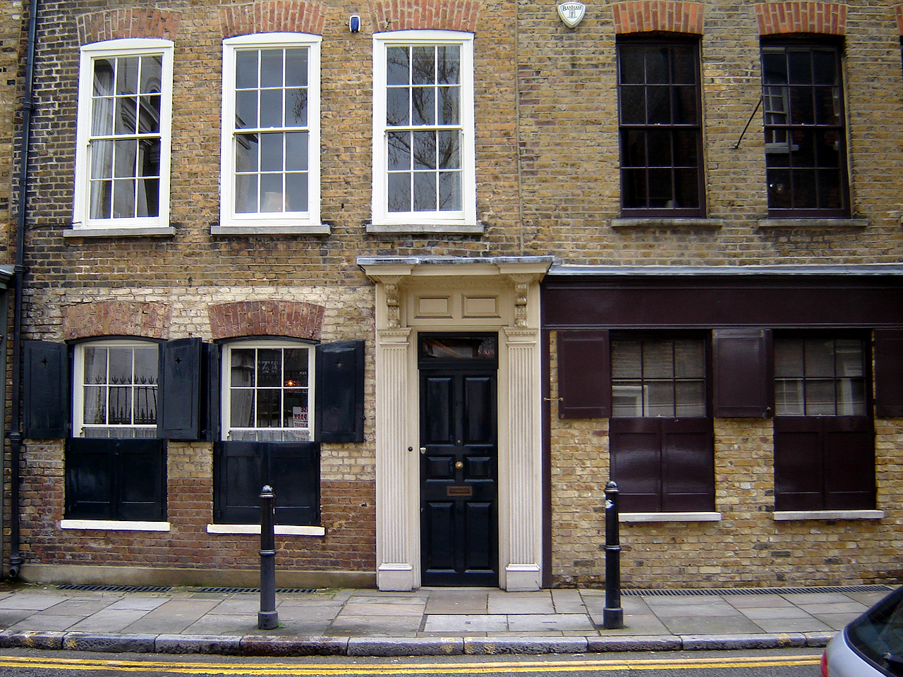 "Fournier Street, Spitalfields"